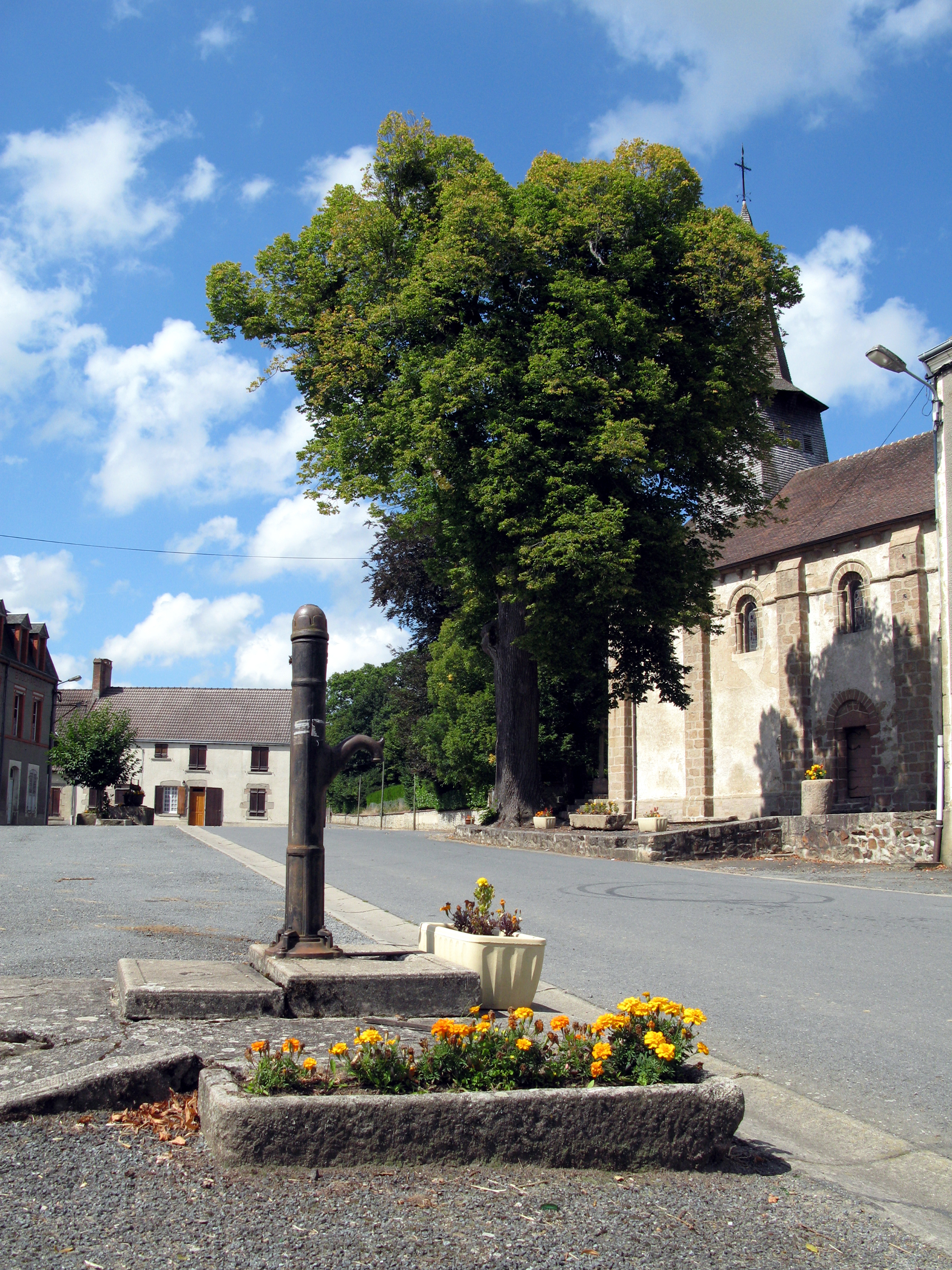 Nouziers (Creuse, France) - Le centre du village. . .